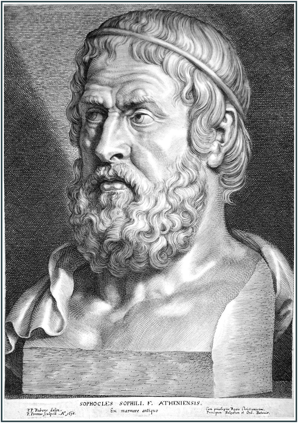 Гравюра с изображением бюста Софокла. Автор изображения Питер Рубенс, гравер Паулюс Понтий. 1638. Размер пластины 30,6 x 22 см. Гравюра из серии, содержащей 12 изображений известных греческих и римских философов и императоров, созданных Рубенсом, на основе оригинальных античных бюстов. Портреты созданы четырьмя граверами под личным контролем Рубенса. Изображение Софокла - одна из пяти гравюр, выполненных для серии Паулюсом Понтием. Опубликована Рубенсом в 1638 году. Вероятно, античные бюсты находились в личной коллекции Рубенса. В настоящее время их местонахождение, а также судьба большинства рисунков из этой серии неизвестны. Пластины были уничтожены для предотвращения изготовления копий.